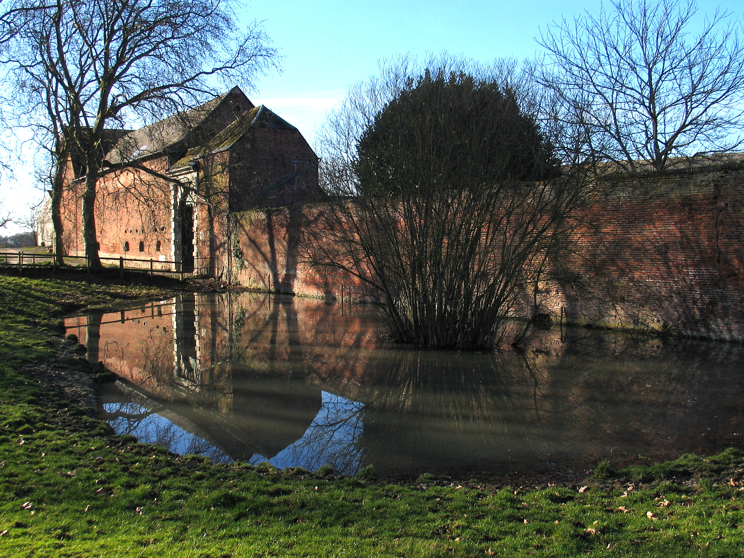 Monnikenhof te Heks, België